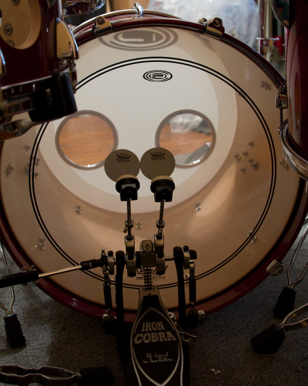 IMG_1308-42